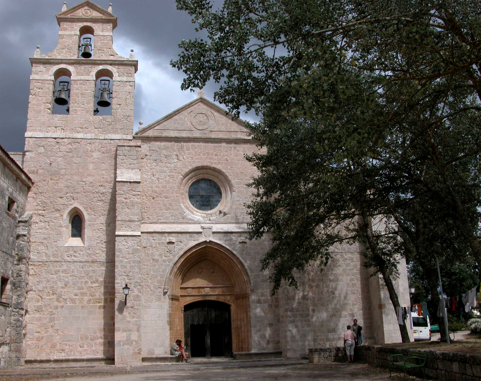 Iglesia de San Juan de Ortega, Burgos - España.